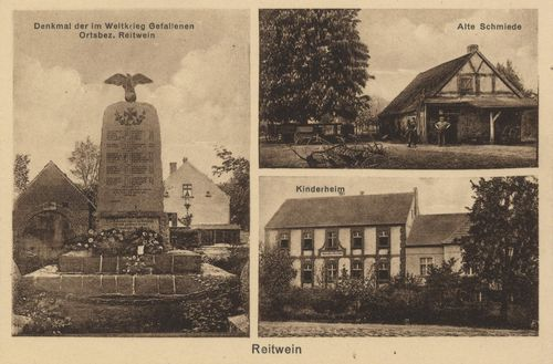 Reitweiner Postkarte mit Schmiede & Kriegerdenkmal & Kinderheim